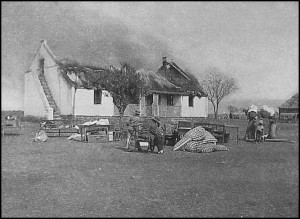 ‘n Plaashuis word afgebrand as gevolg van die verskroeideaarde-beleid.